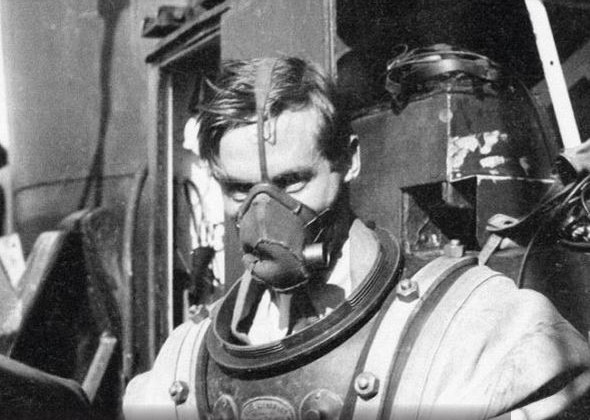 Arne Zetterström - Tekniskt geni med tragisk död